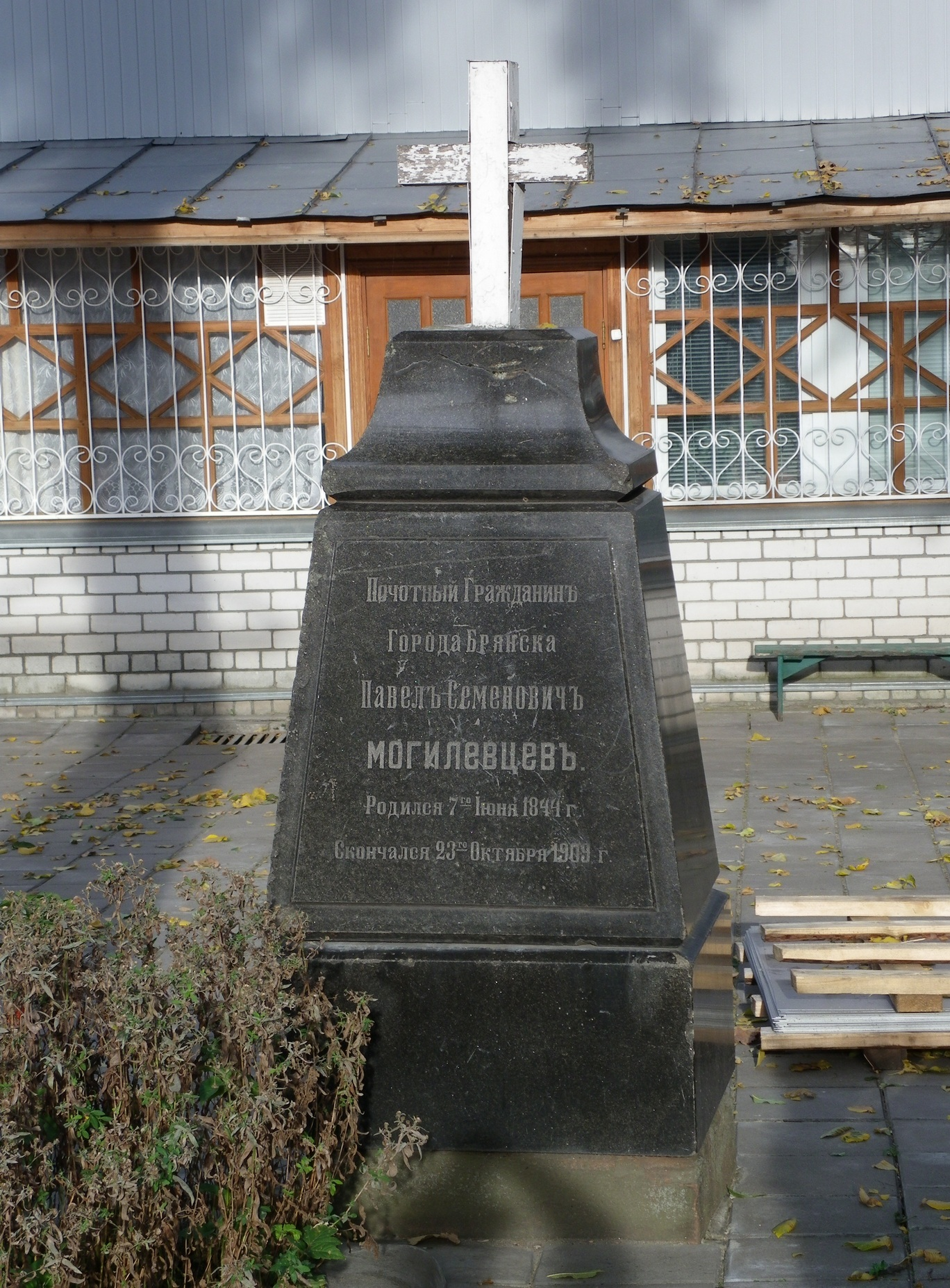 Фрагмент надгробия П С Могилевцева, хранящийся на территории Петропавловского монастыря в Брянске